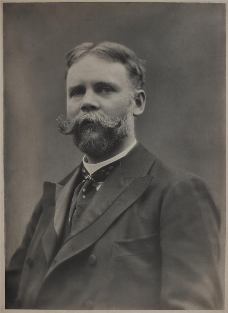 Premier autoportrait connu du photographe, vente aux enchères "Photographies par Otto Wegener (1849-1924)" à Hôtel de vente Drouot le 8 novembre 2018